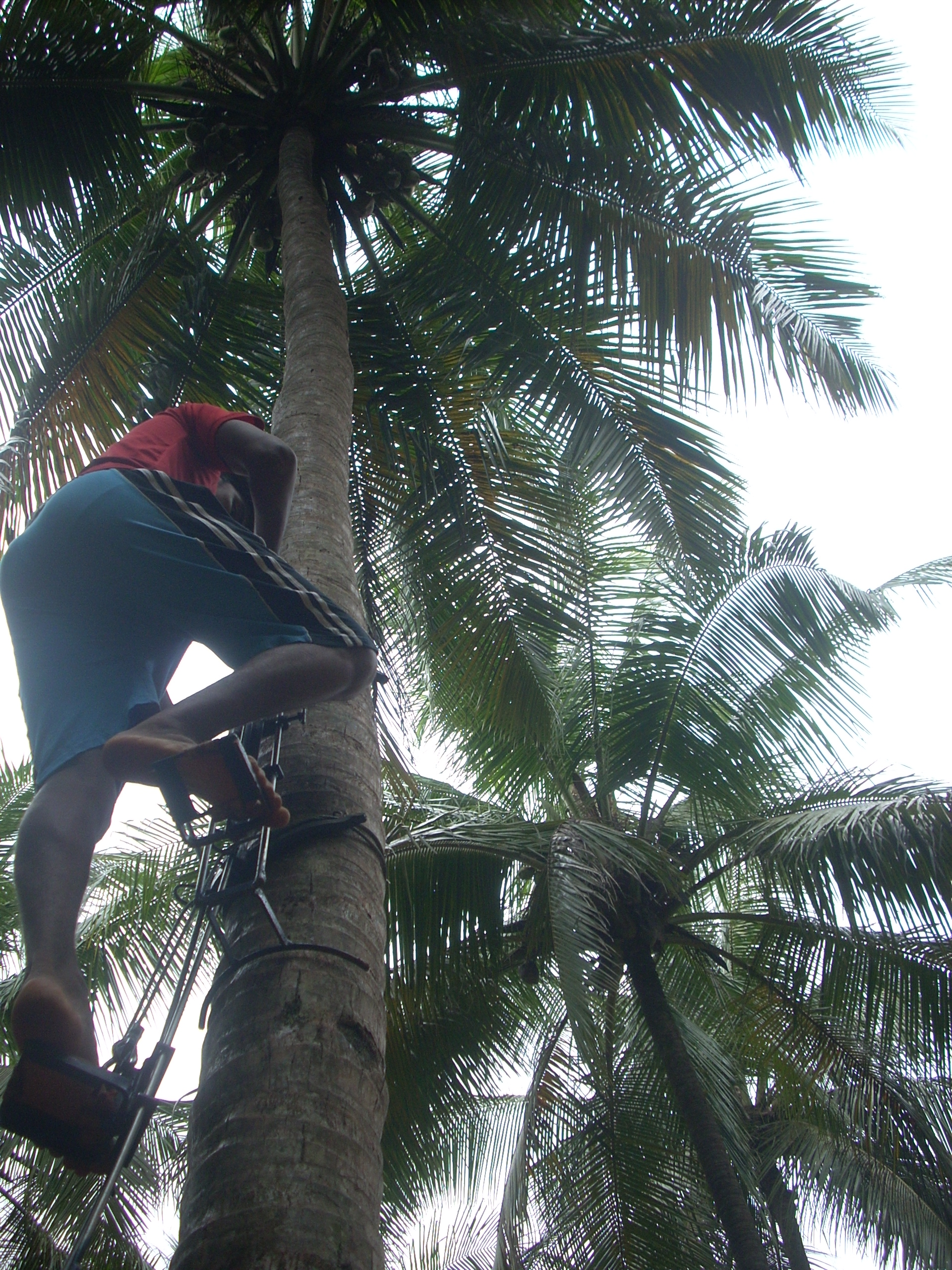 യന്ത്രമുപയോഗിച്ചുള്ള തെങ്ങുകയറ്റം.വടക്കാഞ്ചേരി ഗ്രീന്‍ ആര്‍മ്മിയുടേയും നാളികേര വികസന ബോര്‍ഡിന്റേയും ആഭിമുഖ്യത്തില്‍ മുണ്ടത്തിക്കോട് നടന്ന പരിശീലന പരിപാടിയില്‍ നിന്ന്